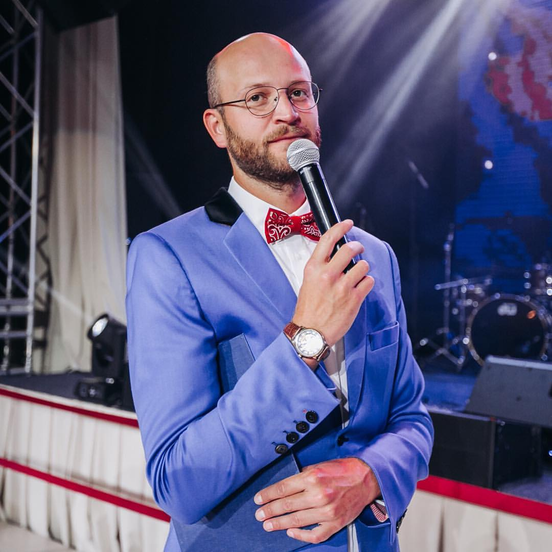 Дмитрий Кузеняткин - ведущий